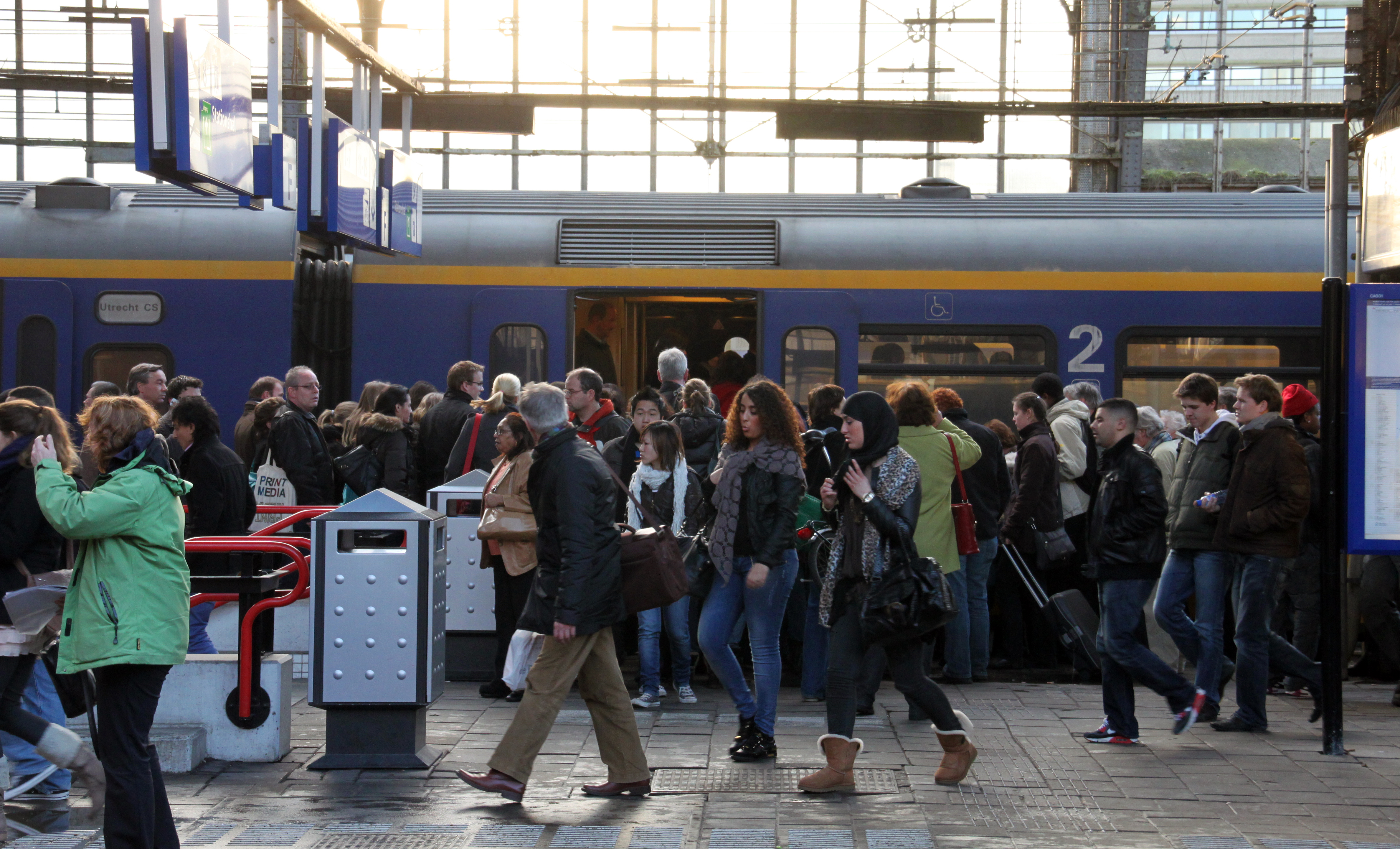 Reizigers op Utrecht Centraal